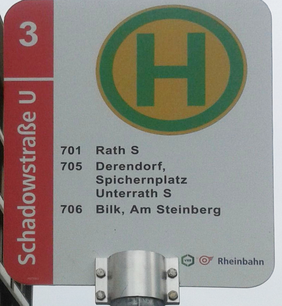 Detailausschnitt des Ersatzhaltestellenschildes in Düsseldorf an der Haltestelle Schadowstraße (U) (ehemals Jan-Wellem-Platz)